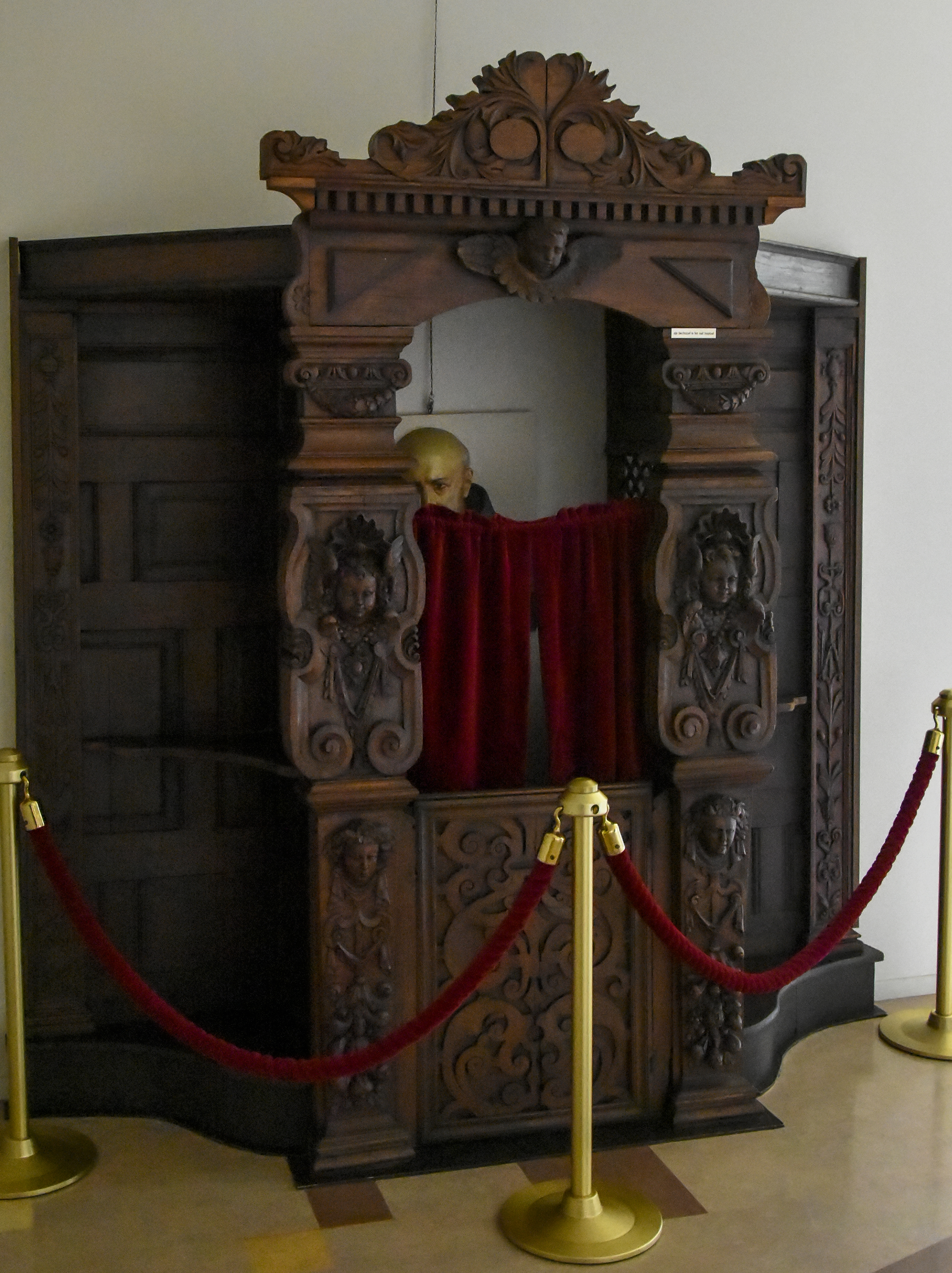 Valentinusmuseum Hasselt, biechtstoel